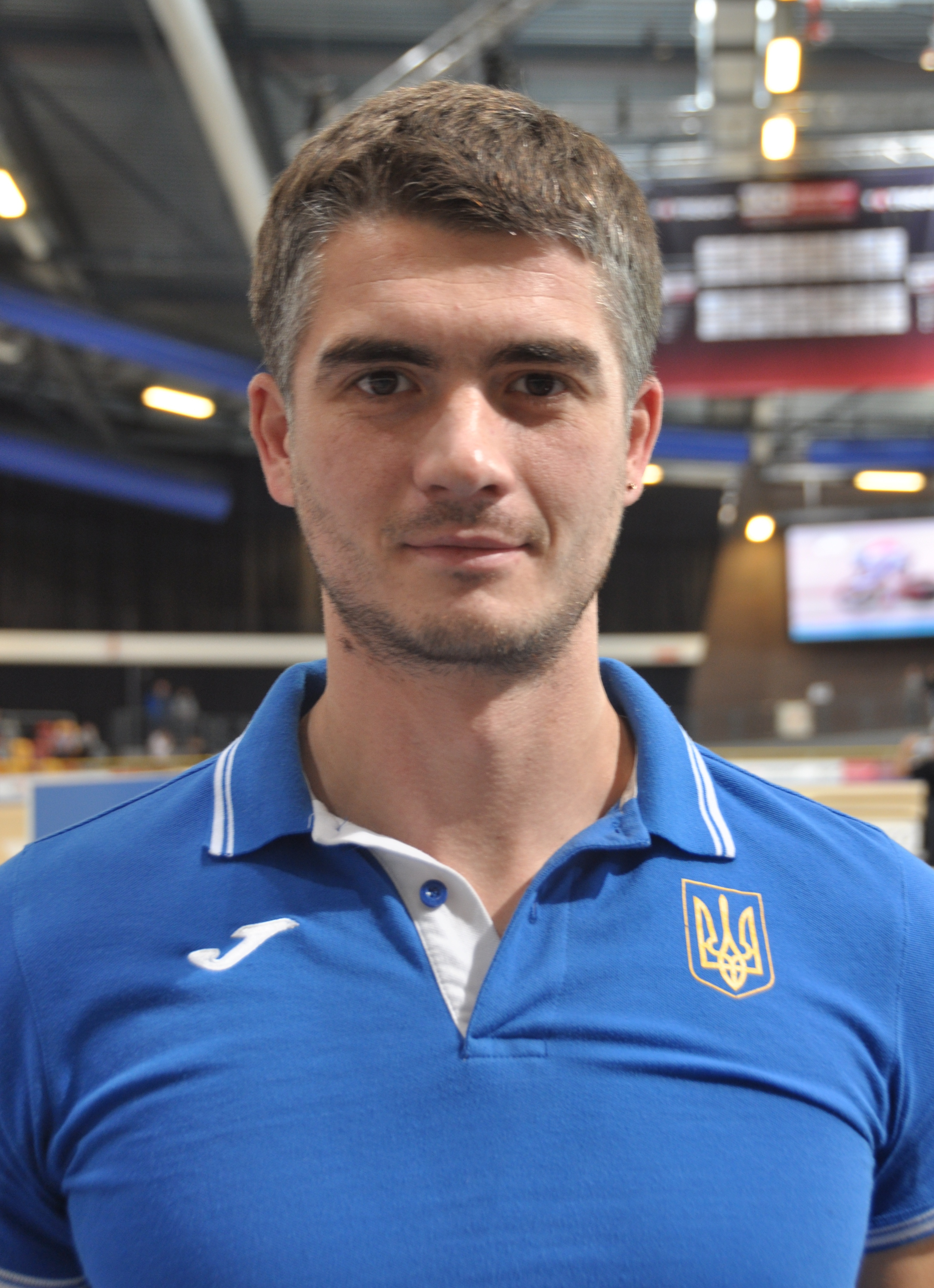 Yevhen Bolibrukh, ehem. ukrainischer Radsportler